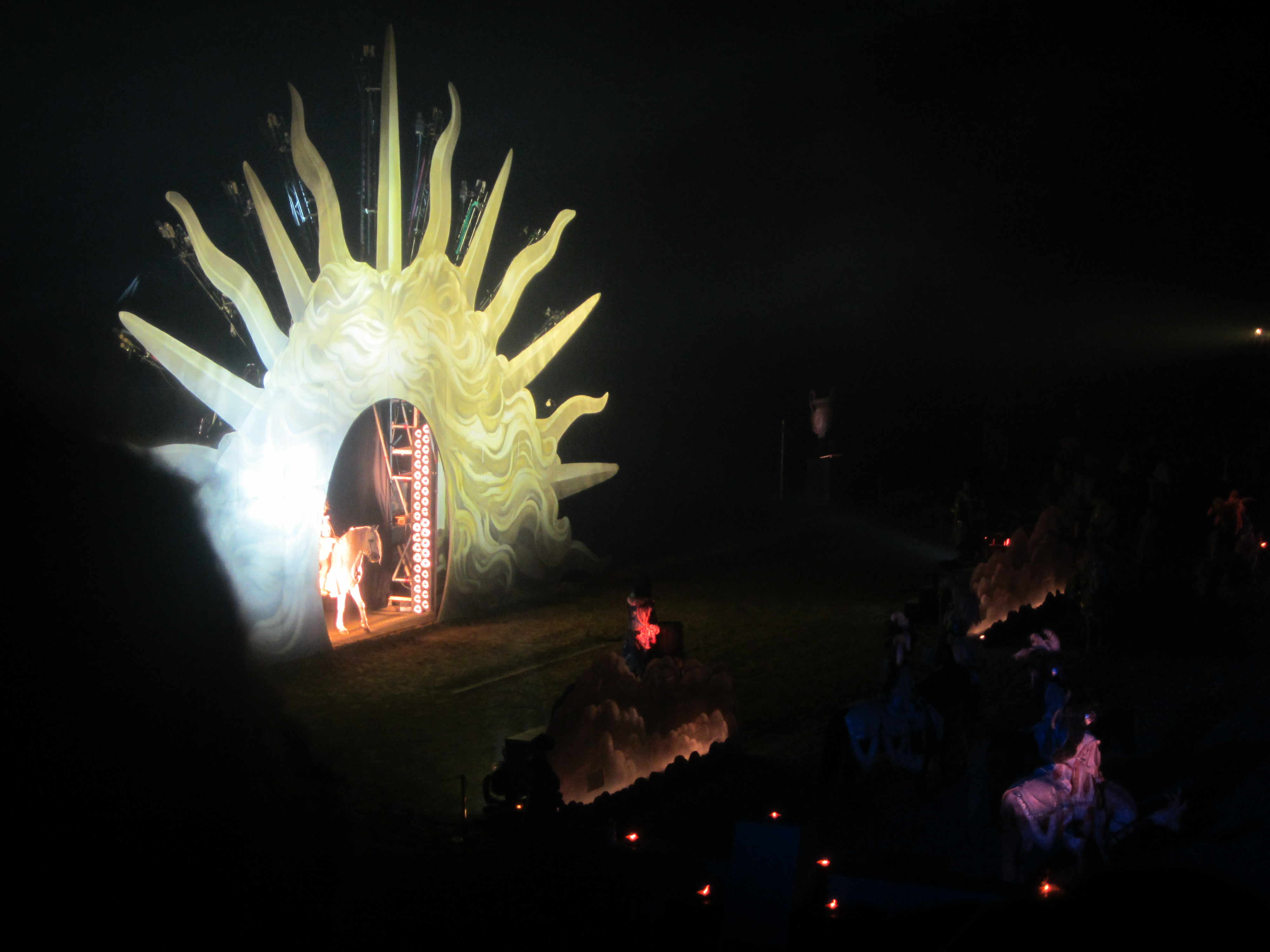 Académie du spectacle équestre (Equestrian Arts Academy) at Versailles